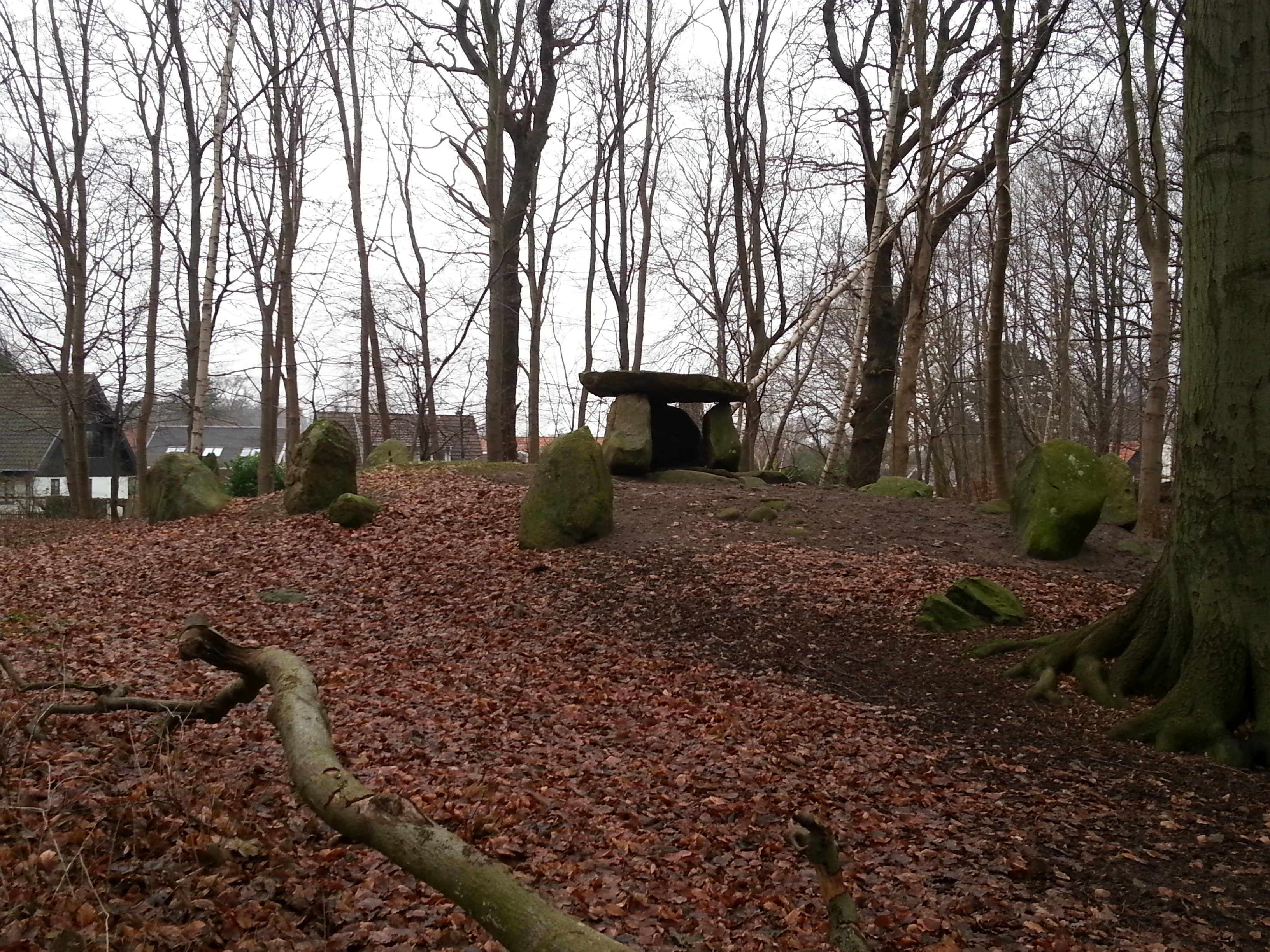 Dysse i Babylone skov ved Humlebæk